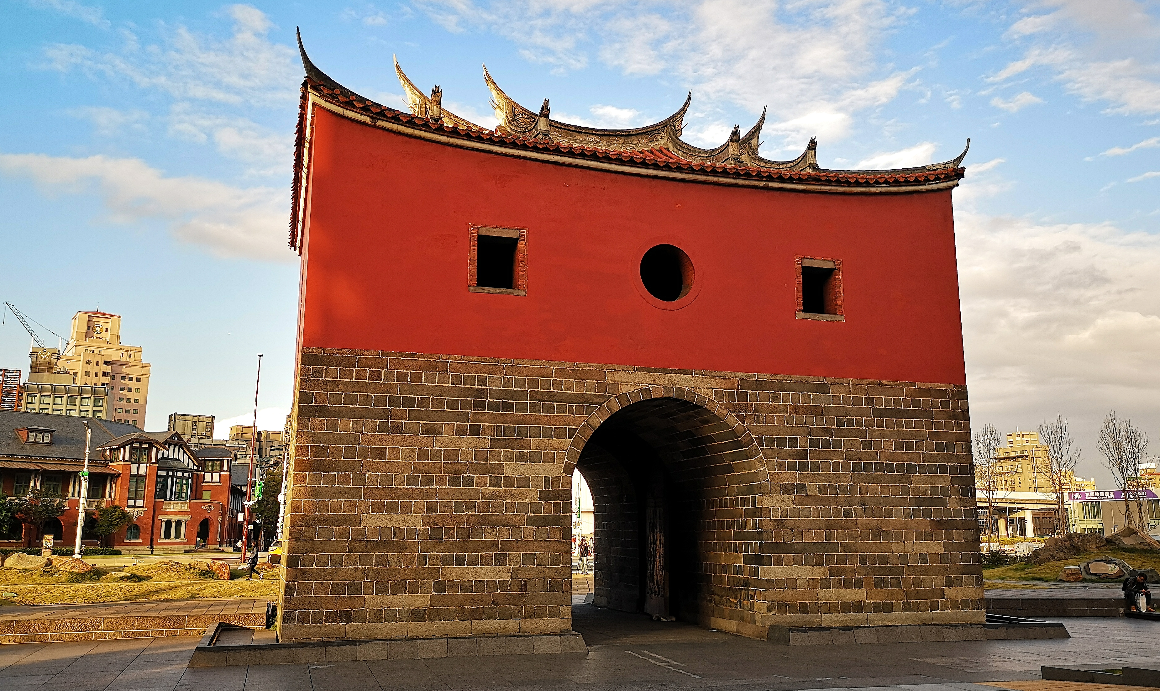 Severní brána v Tchaj-peji, Tchaj-wan.